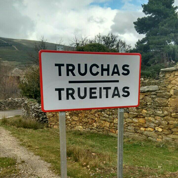 Letrero en castellano y en leonés que refleja los dos topónimos, oficial y autóctono, de la localidad de Truchas / Trueitas en la provincia de León